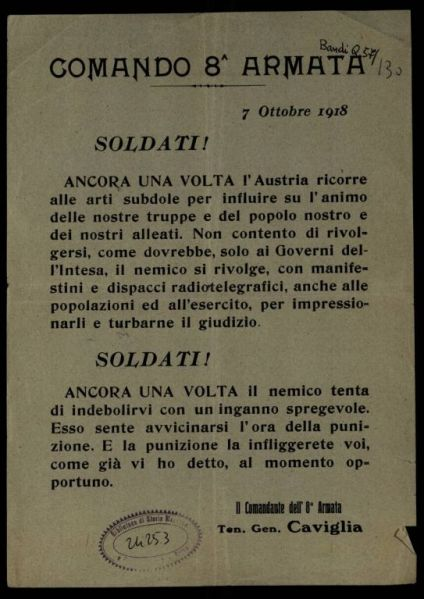 Soldati! / Comando 8ª armata